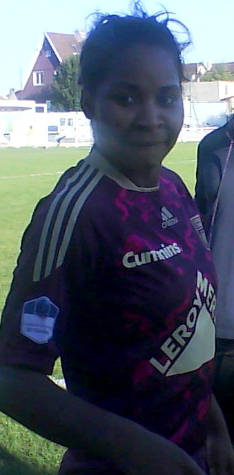 Laura Georges après le match Juvisy-Lyon